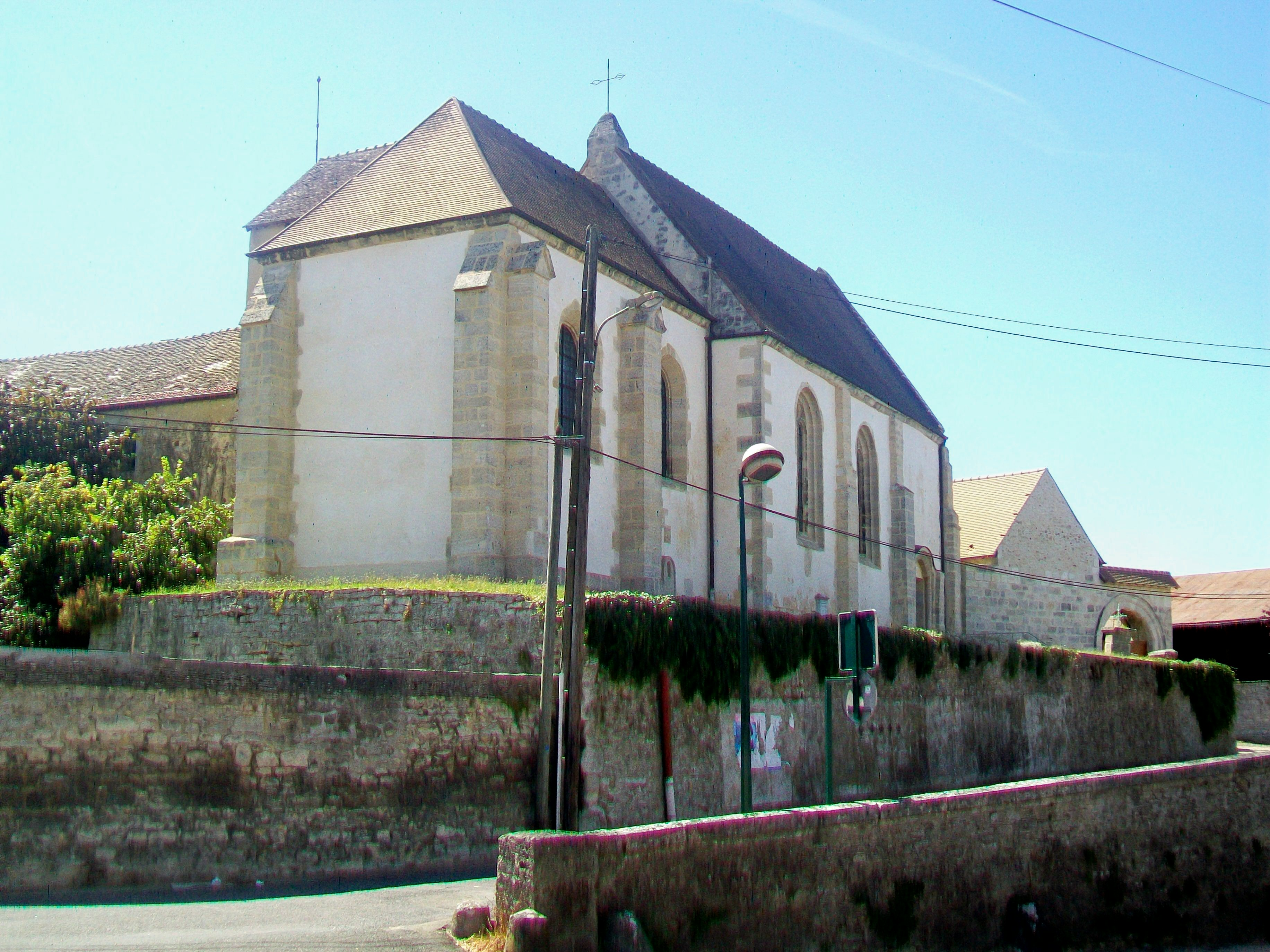 Vue sur l'église depuis le nord-est. Seul la façade nord donne sur la voie publique.